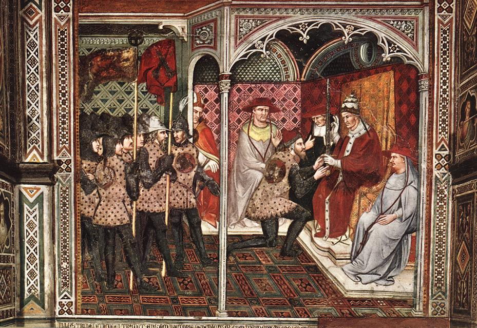 Papst Alexander III. empfängt einen Gesandten. Fresko im Palazzo Pubblico in Siena Pope Alexander III Receives an Ambassador